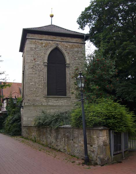 St. Johannes, Wolfenbüttel, abgesetzter Glockenturm